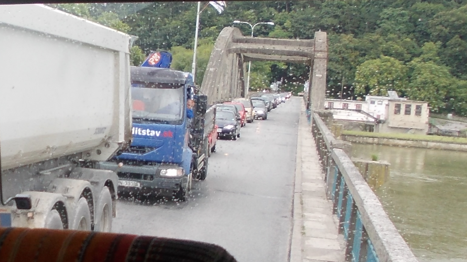 Krajisnký most